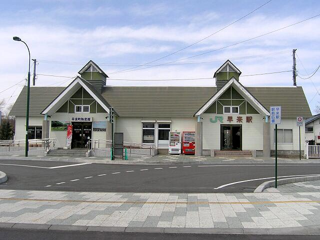 Hayakita Station in Muroran Main Line, Japan